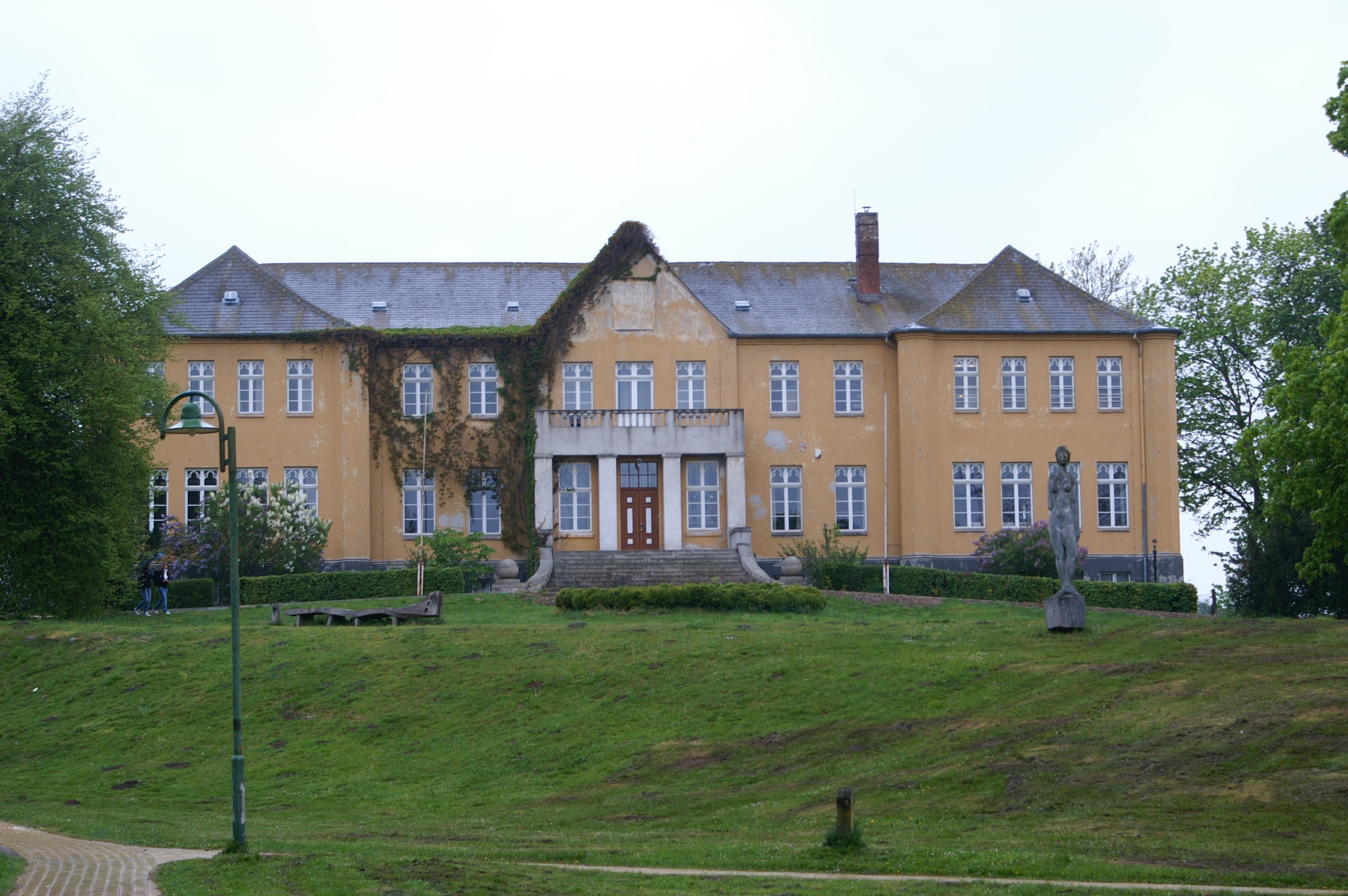 Ehemaliges Herrenhaus Schloss Wieck bei Gützkow (Landkreis Ostvorpommern), Parkseite